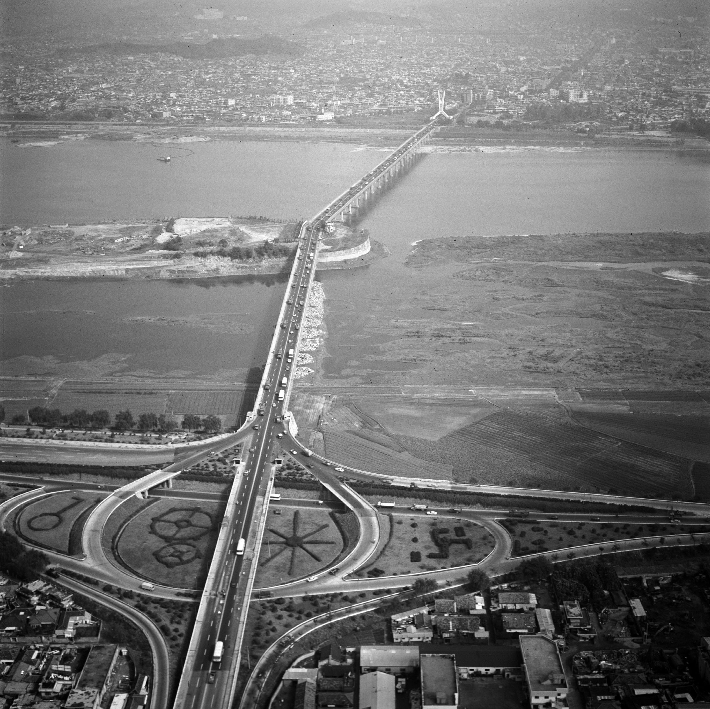 촬영장소 : 대한민국 서울 제2한강교 참석자 : 없음 관련내용 : 하늘에서 본 제2한강교(양화대교)